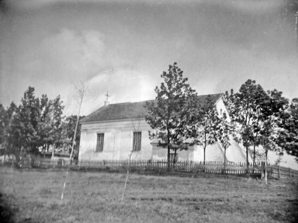 Беларуская (тарашкевіца): Шкунцікі (Škunciki). Касьцёл